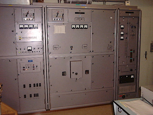 Schweizerischer Botschaftsfunk 10 kW-Sender von Marconi (1998)